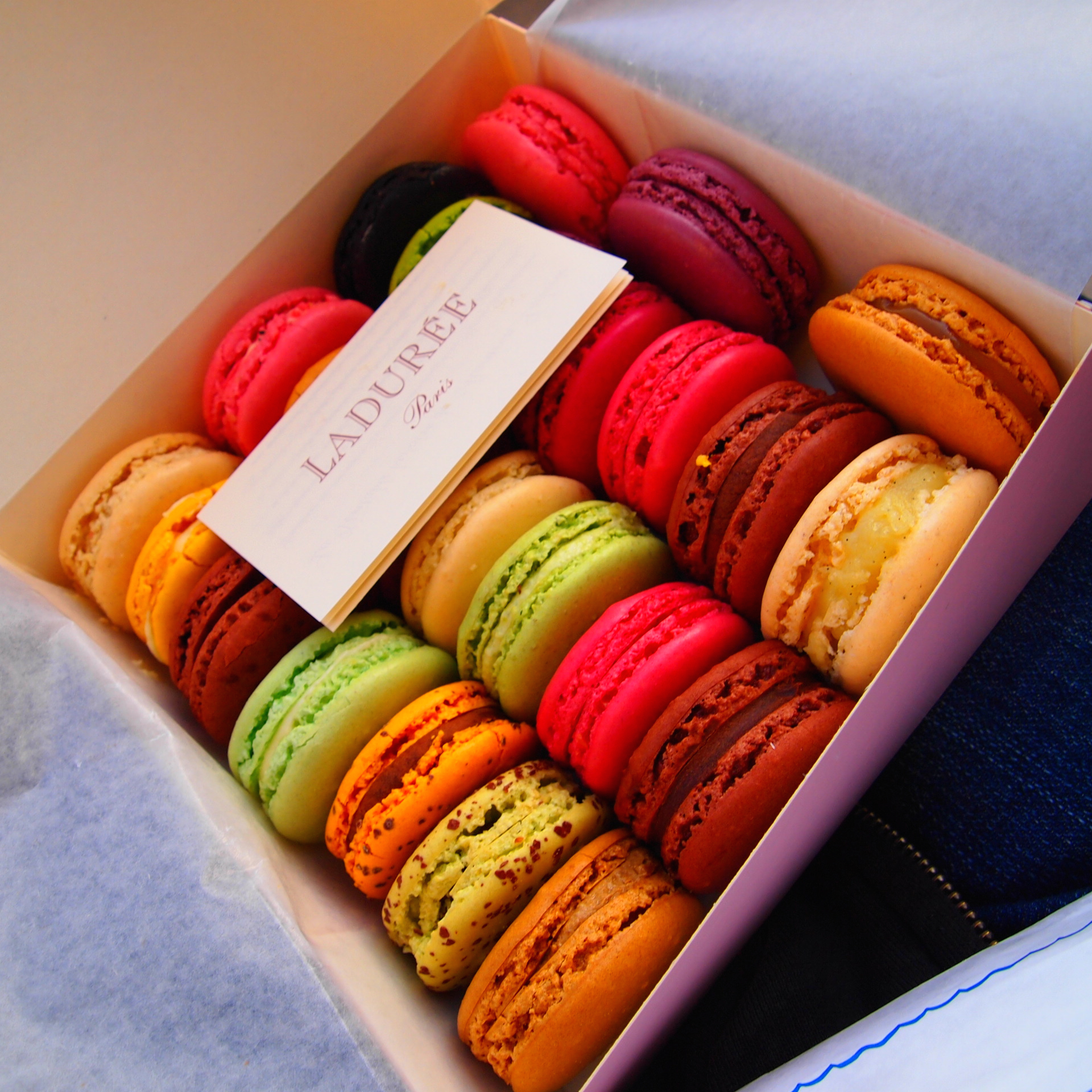 “Edible rainbow”. Macarons from Ladurée, Paris, France.